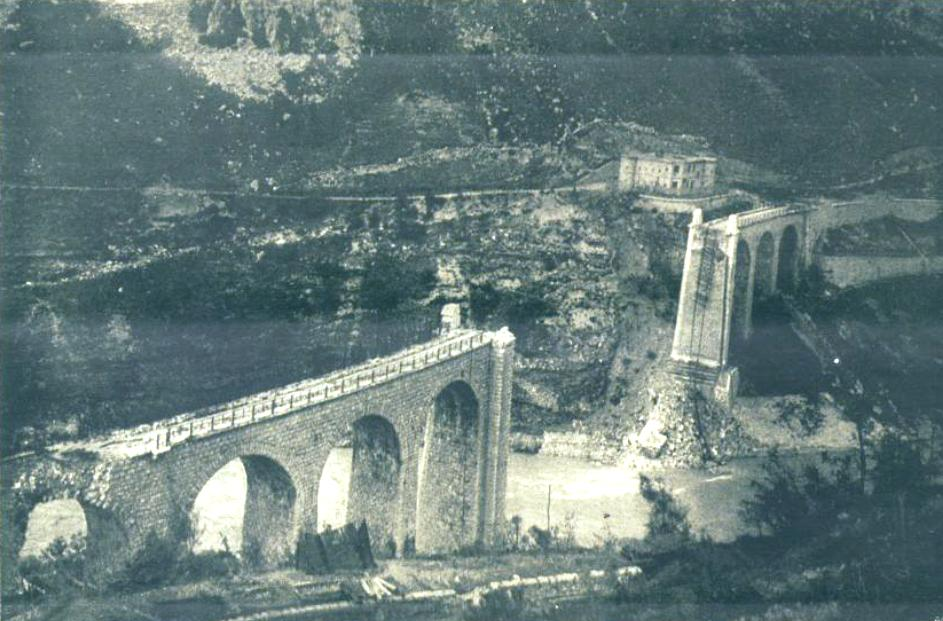 Porušeni solkanski most